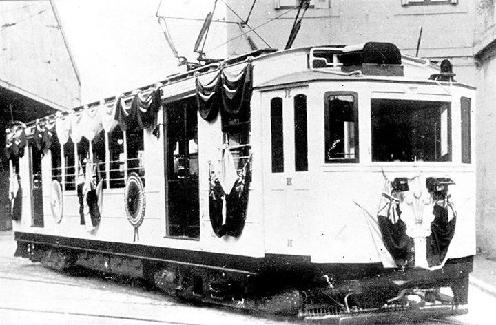 El coche United Electric fue construído en la ciudad británica de Preston en 1912 y enviado a Buenos Aires a mediados de 1913 junto a tres unidades idénticas. En esta foto, el coche 4 fue engalanado para recibir al entonces Principe de Gales, futuro rey Eduardo VIII de Gran Bretaña en 1925